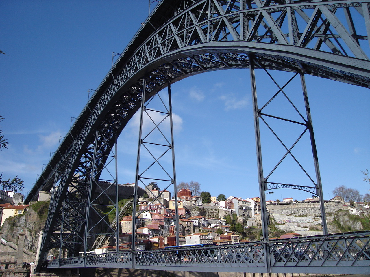 Ponte Dom Luis I, Oporto, Portugal